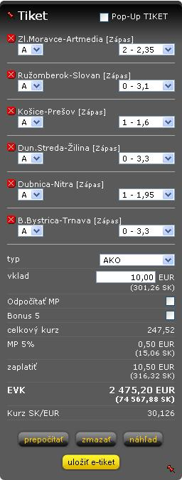 prirpavený zoznam zápasov v stávkovej kancelárií Fortuna prostredníctvom Internetu